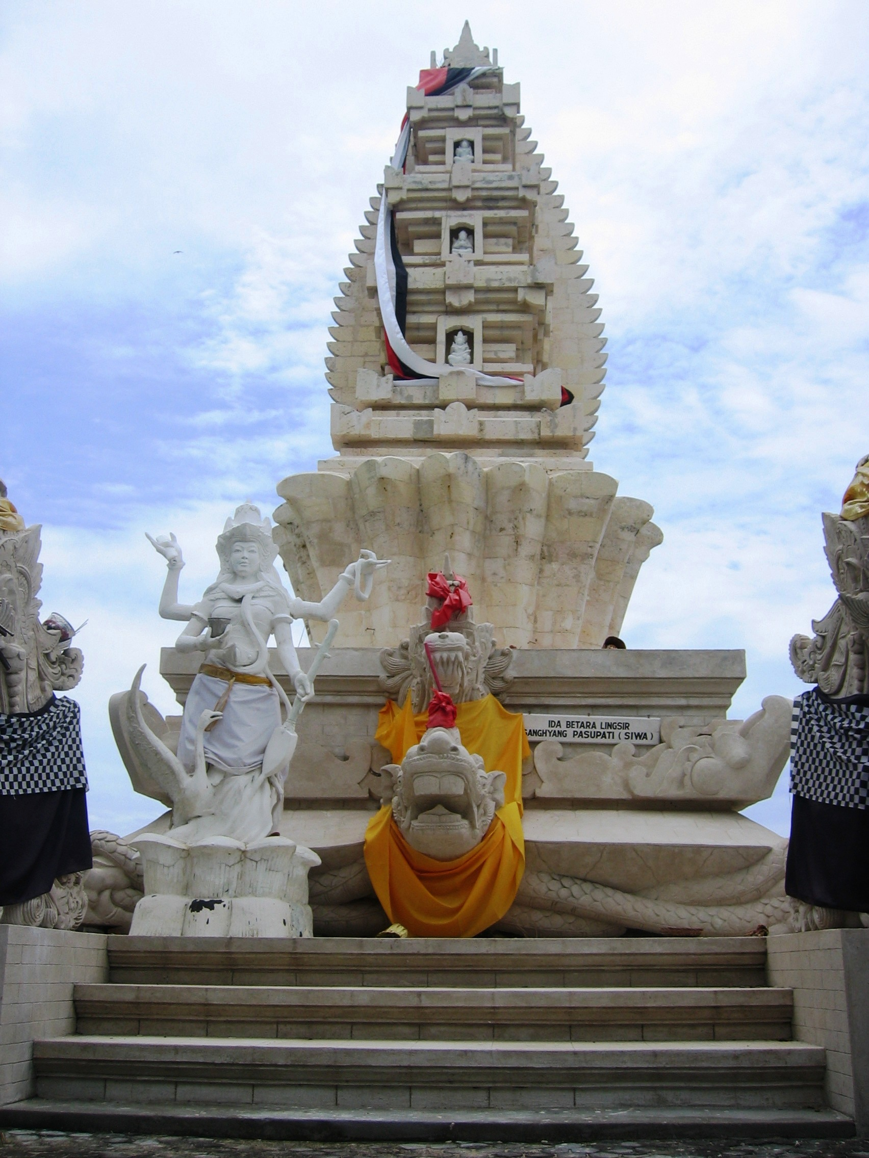 Temple Pura Taman Kelenting Sari sur l'île de Menjangan (Bali, Indonésie)